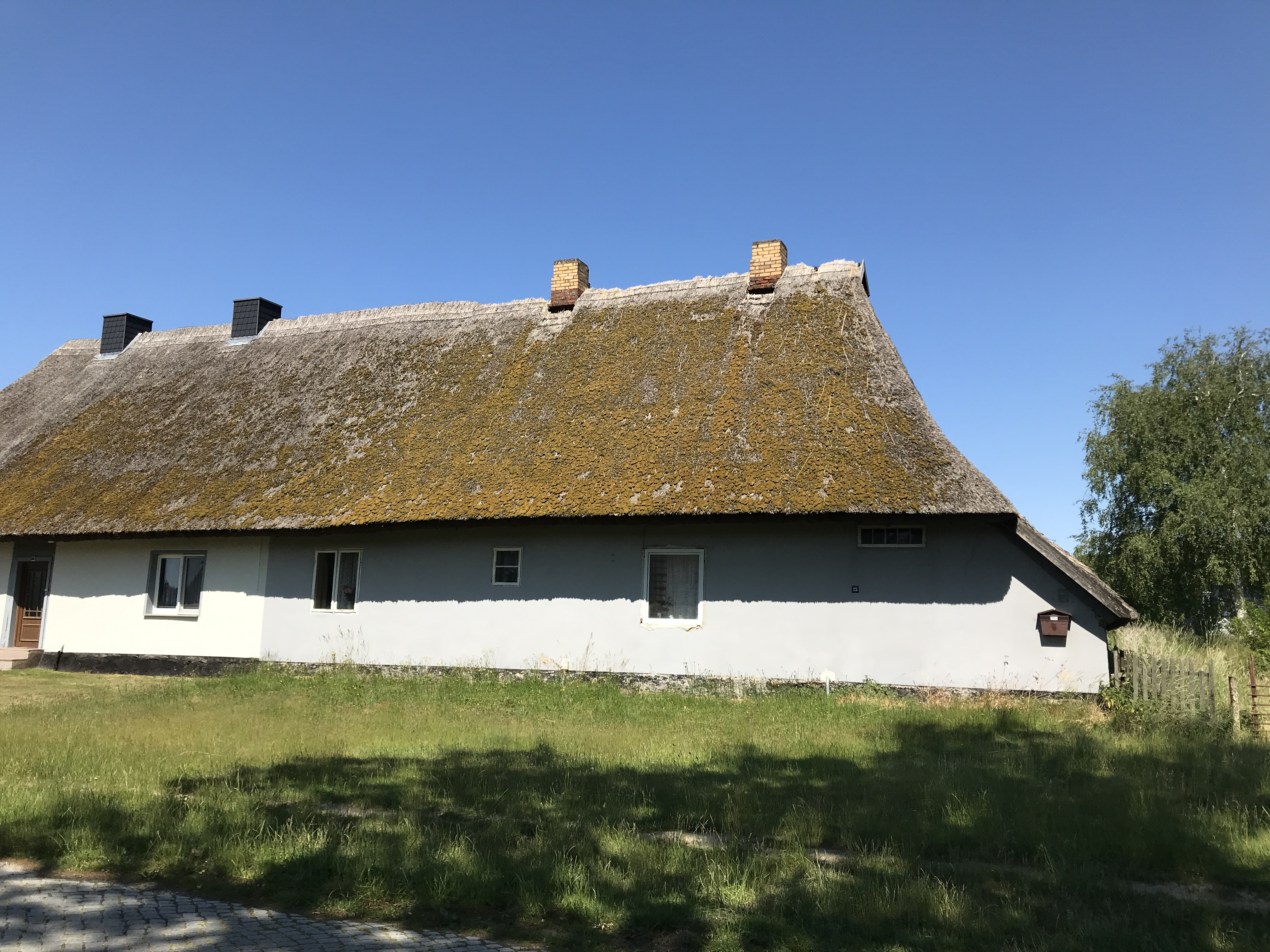 Denkmalgeschützter Katen in Karin bei Barth in Mecklenburg-Vorpommern